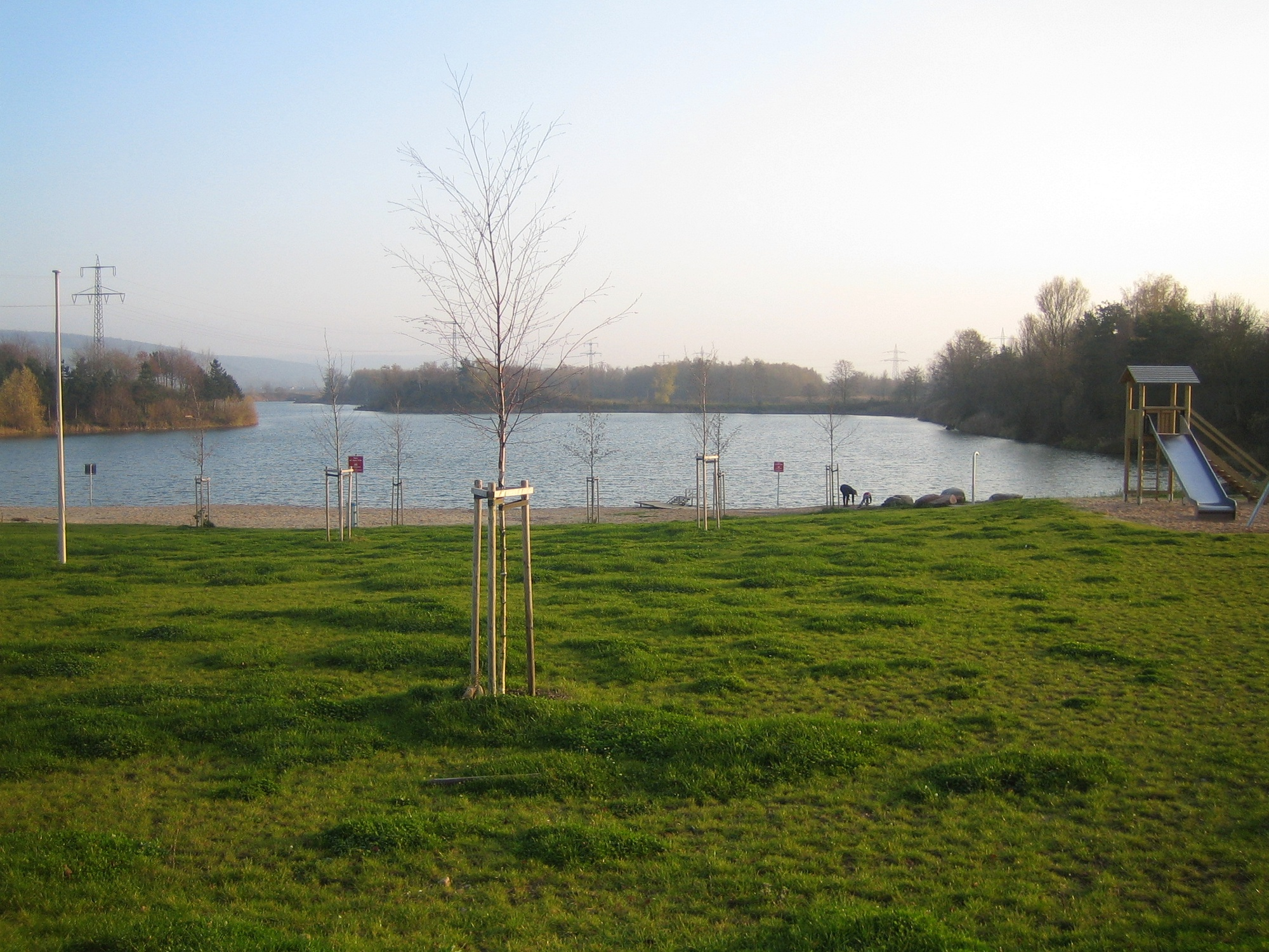 Badestrand "HonischBeach" in Niedernberg, Bayern, Deutschland